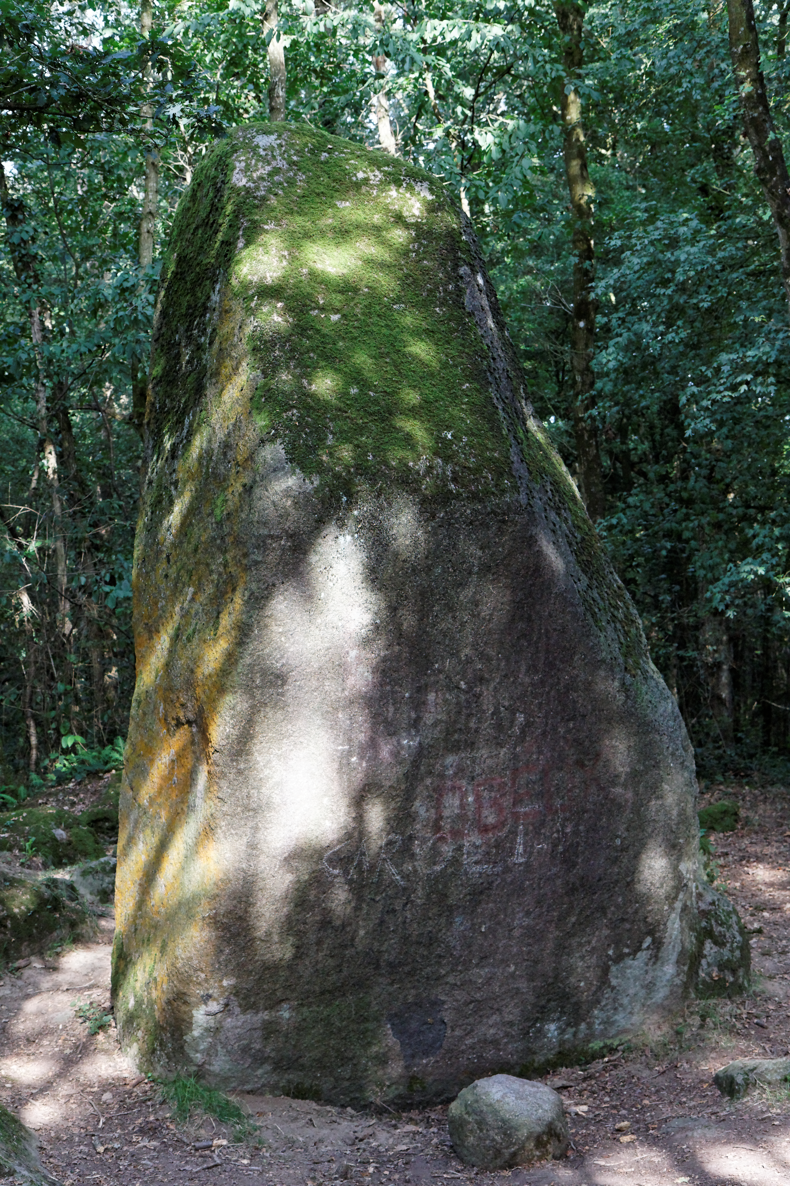 Le menhir de Guihallon à proximité de Tregomar, sur la commune de Lamballe (Côtes d'Armor).